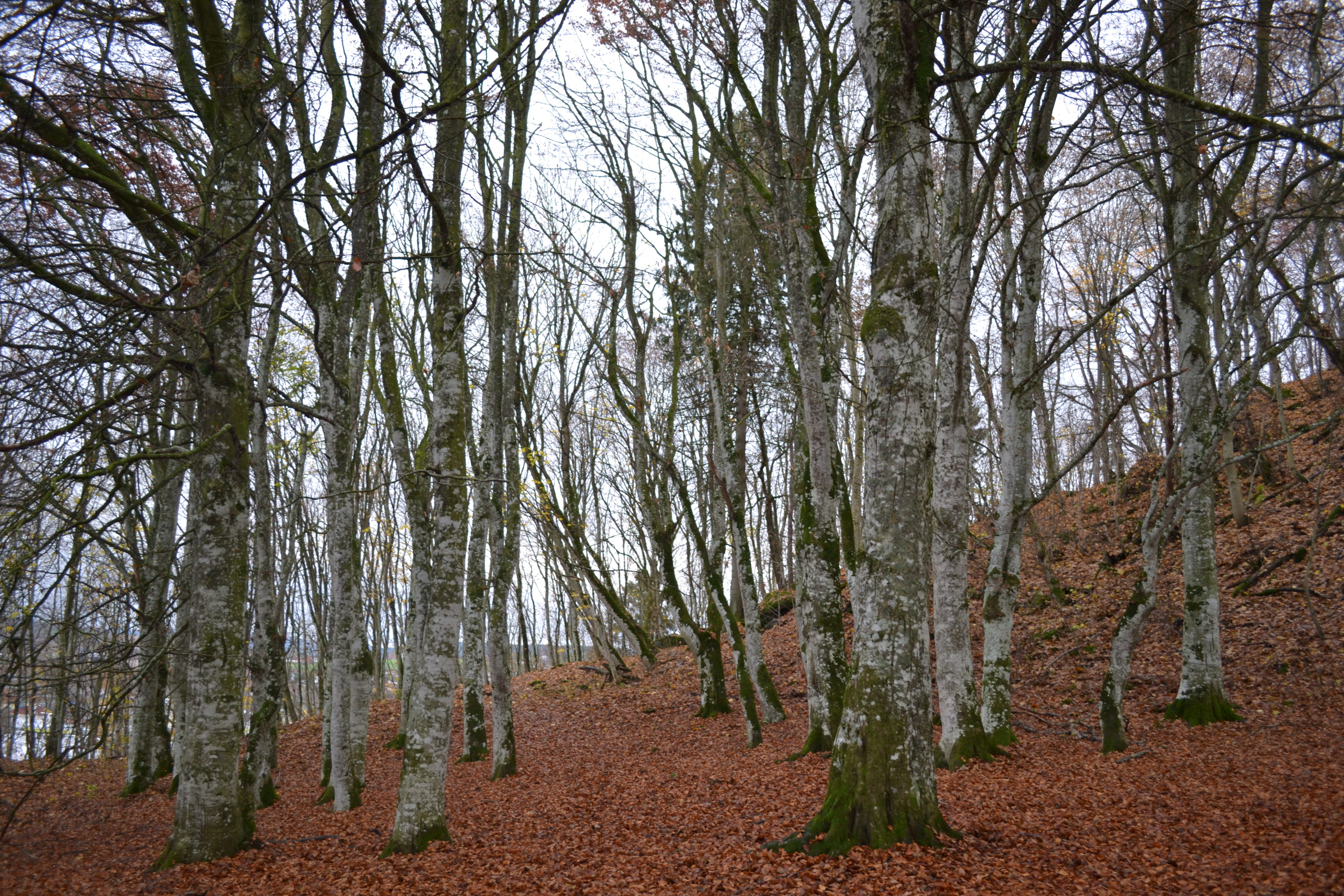 den nordligste bøkeskøgen i Europa,ligger i Levanger i Nord Trøndelag,ved siden av verksted.